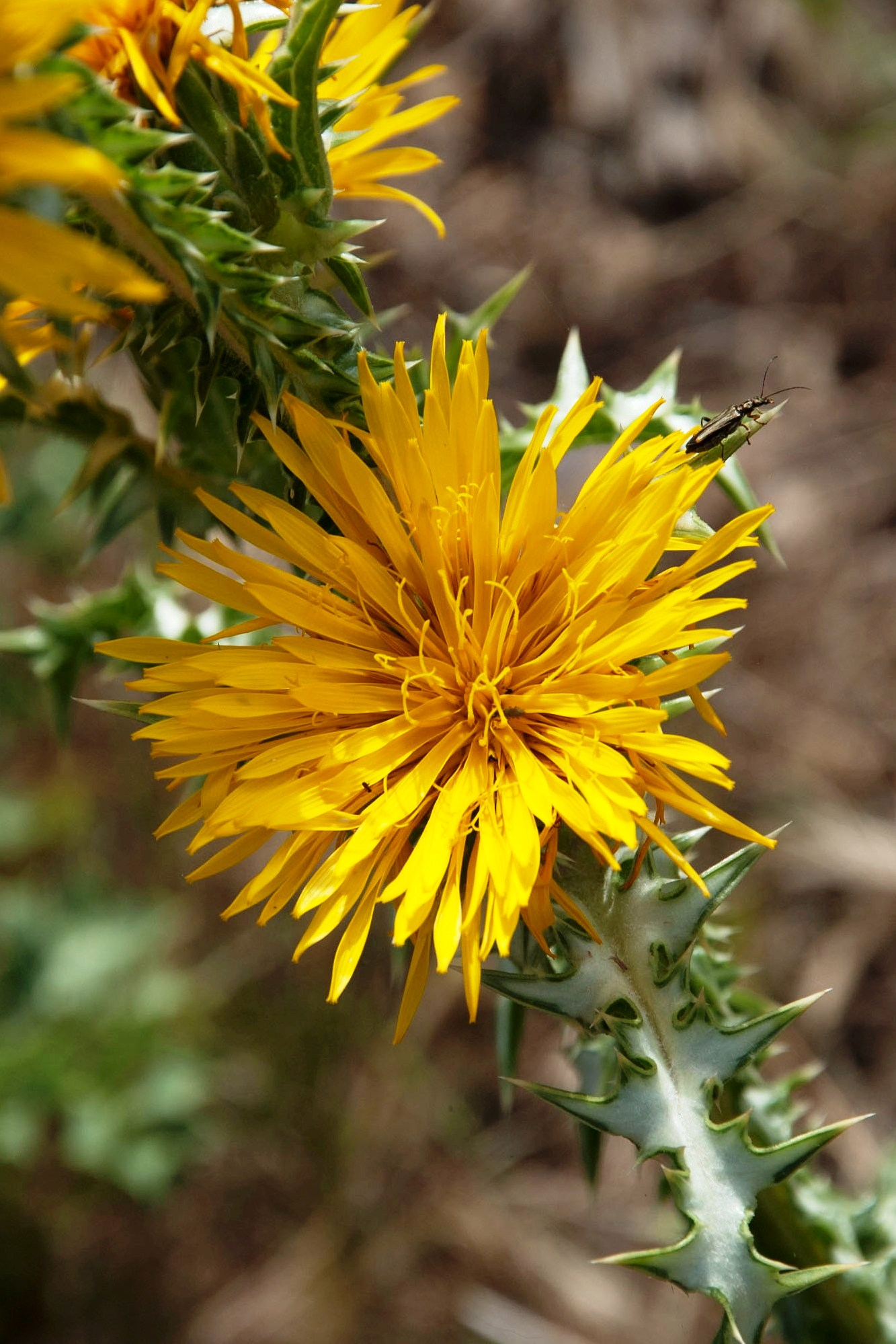 Scolymus grandiflorus Desf.Riserva naturale Monte Pellegrino